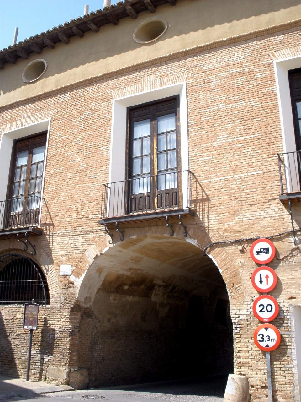 Palacio de los Duques de Villahermosa (Pedrola, Zaragoza)